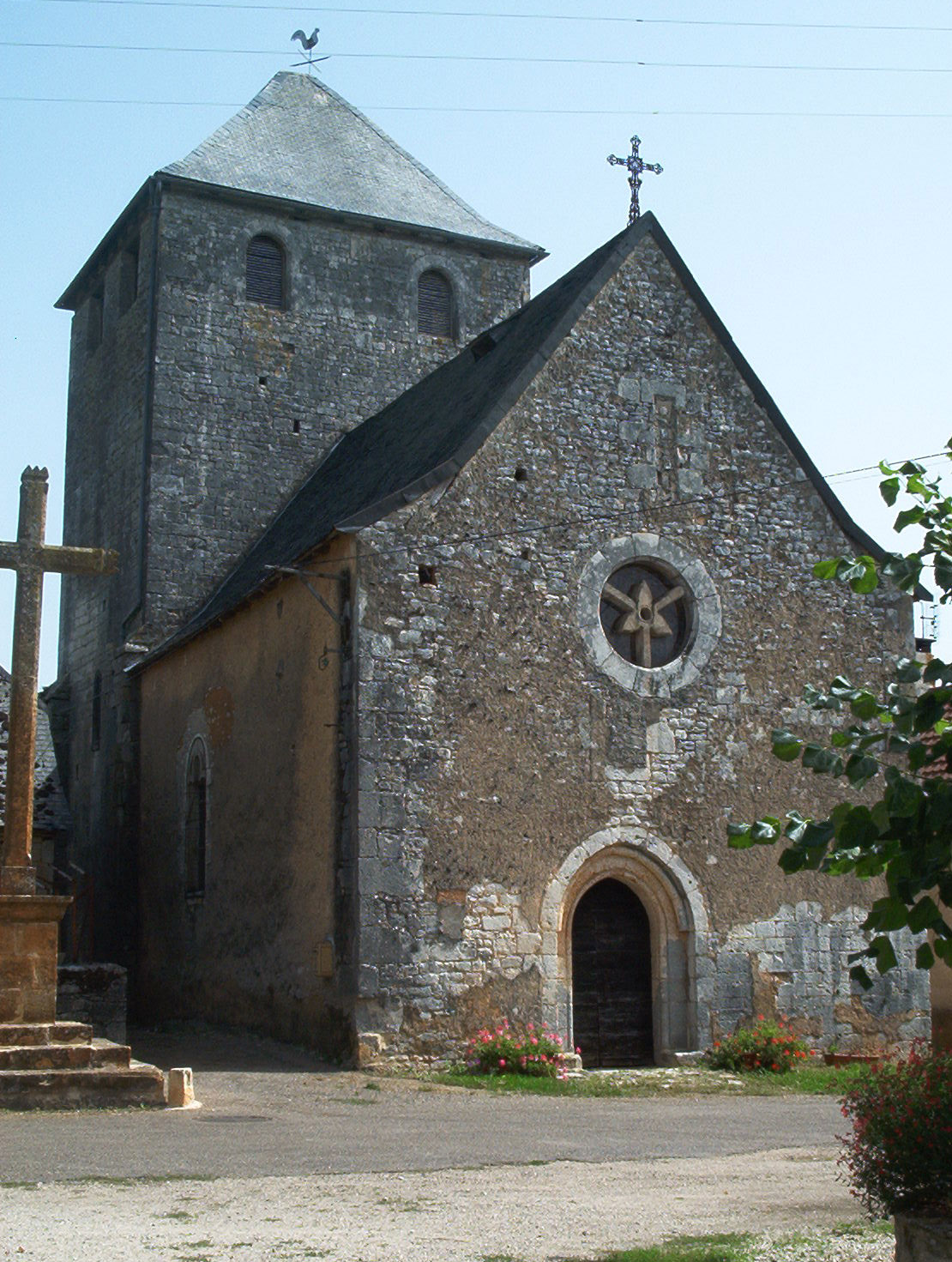 Eglise Saint Bonnet de Gignac Lot